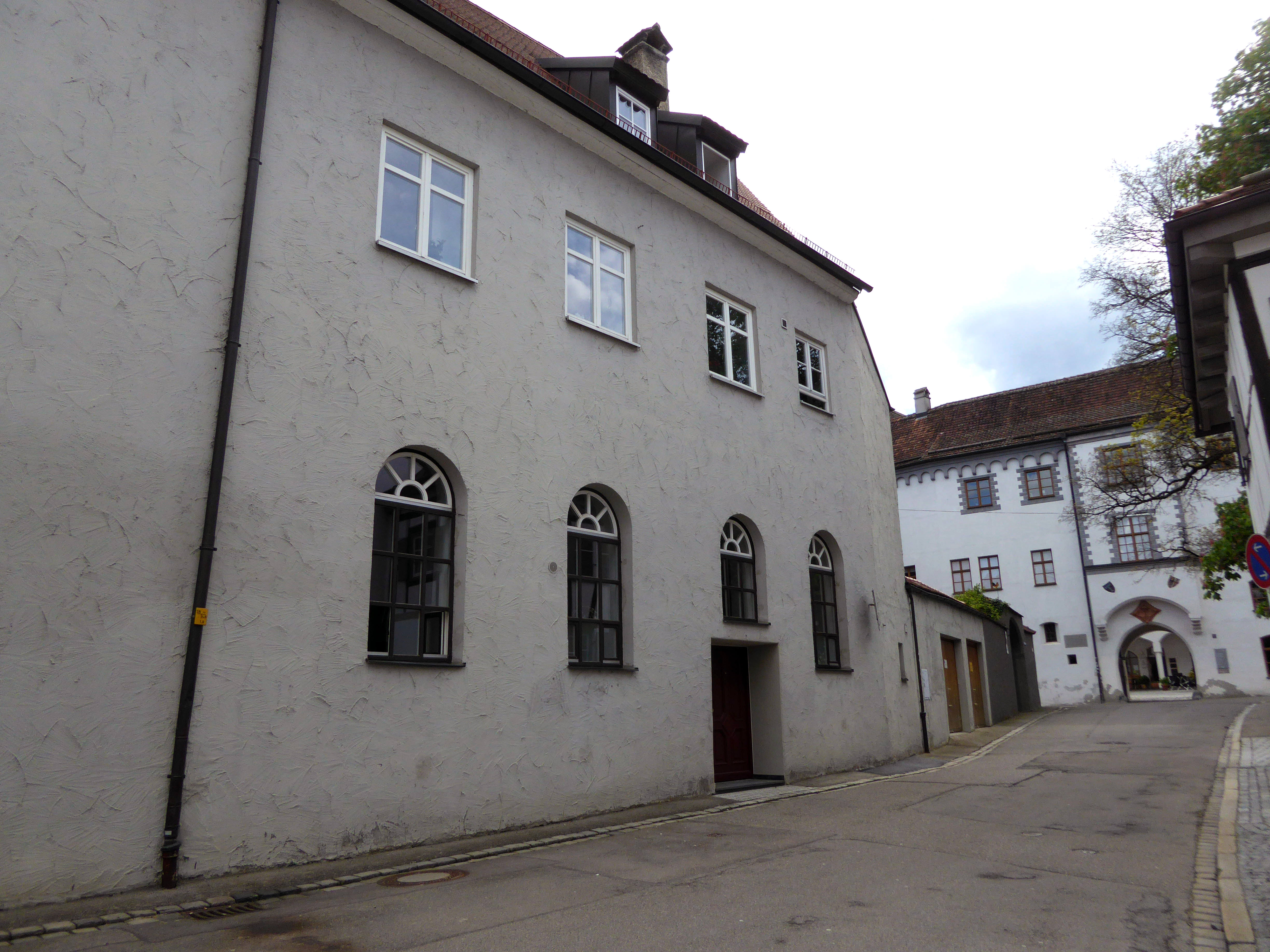 Nordflügel des Fuggerbaus, Memmingen. Im Erdgeschoss war zwischen 1879 und 1909 der Betsaal der jüdischen Gemeinde untergebracht.